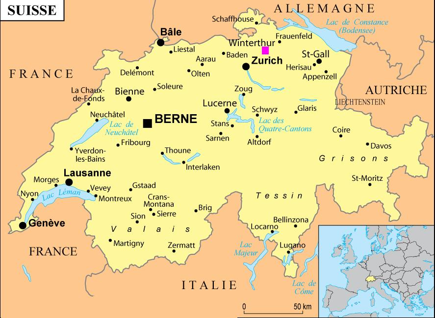 Carte de Suisse. Point rose sur la ville de Winterthur.